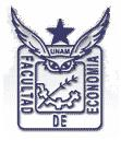 Escudo de la Facultad de Economia, de la UNAM